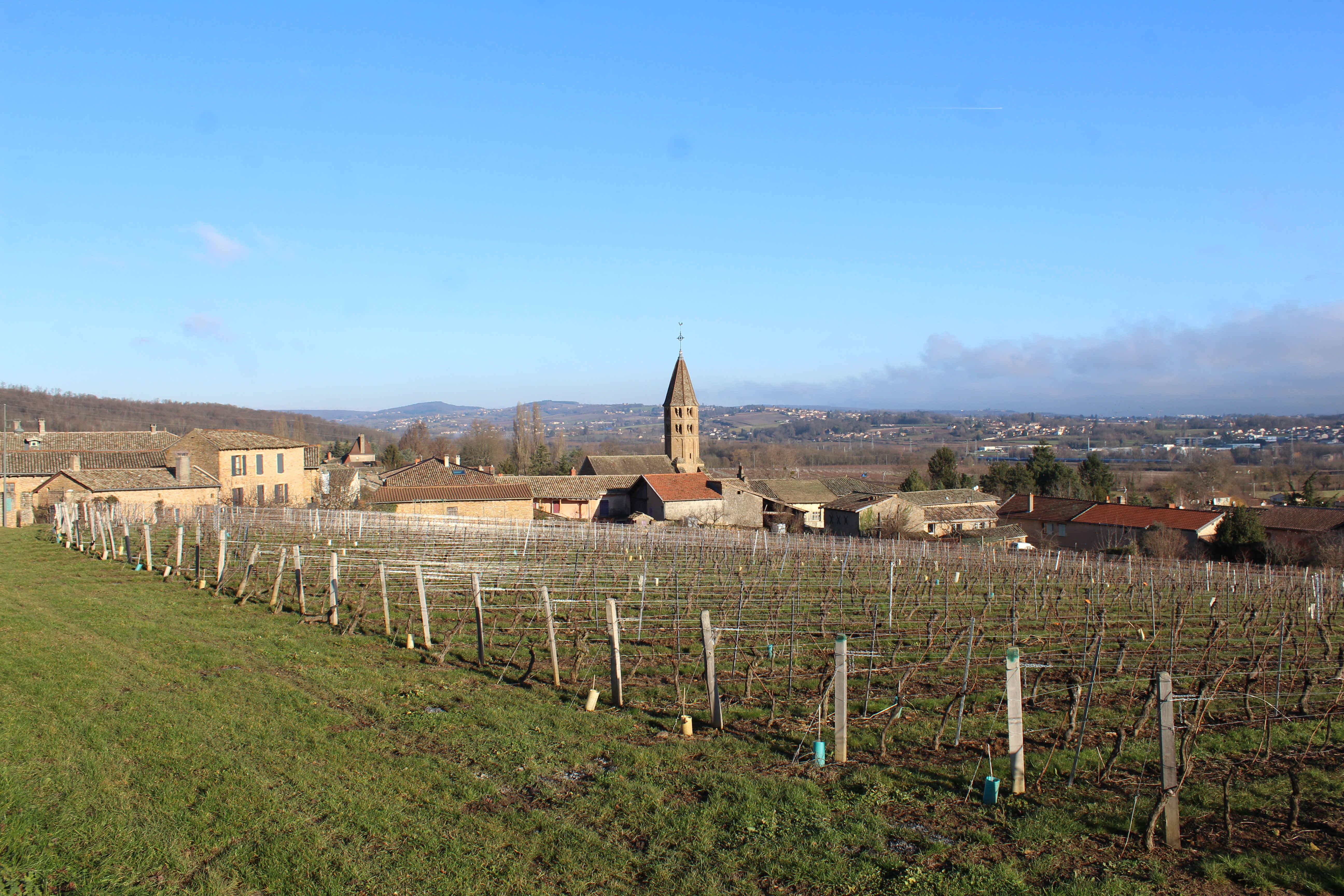 Vue sur le bourg de Loché.